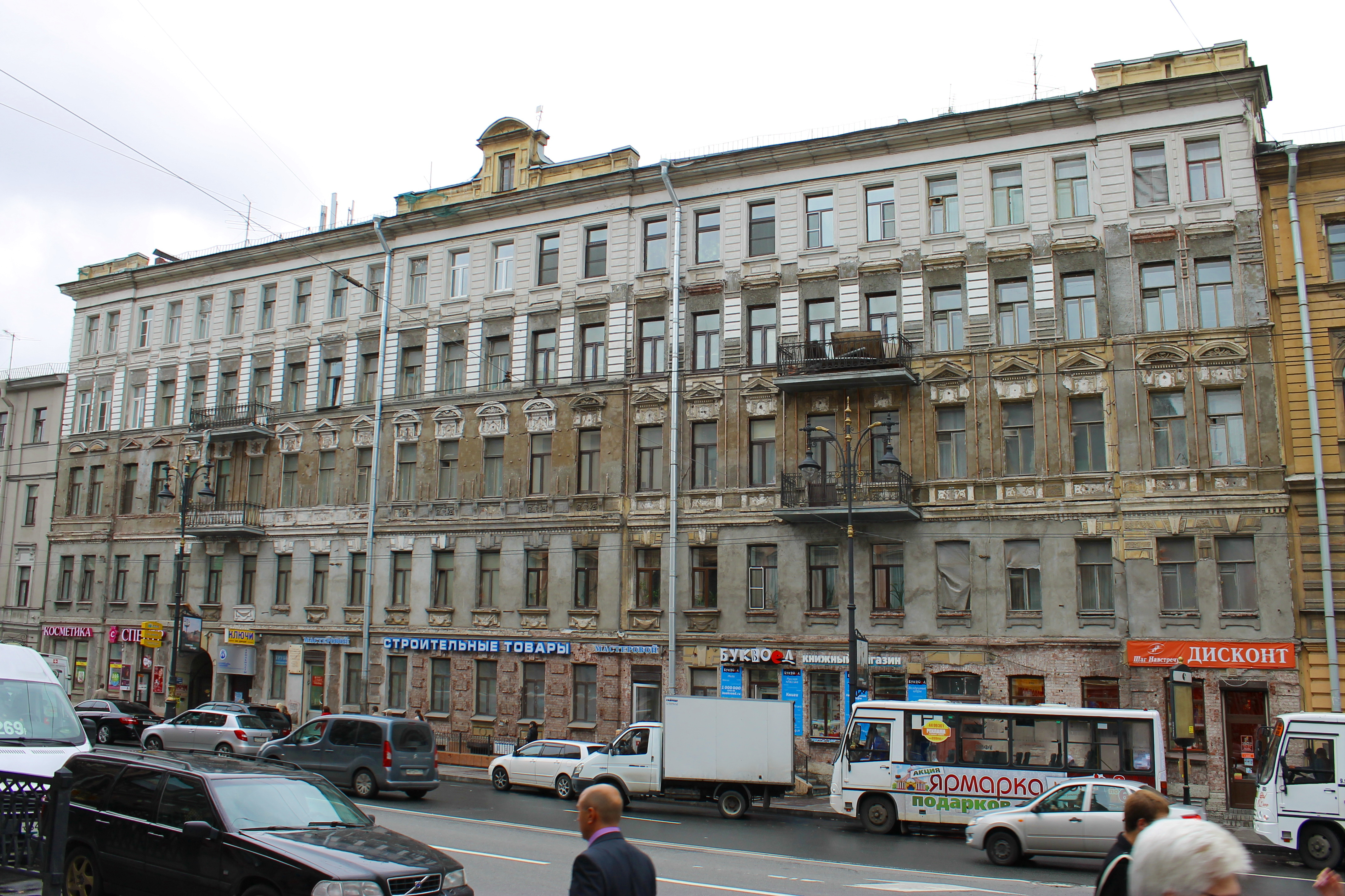 Дом, в котором проживал в Санкт-Петербурге профессор-хирург В. А. Оппель (Кирочная, 23)